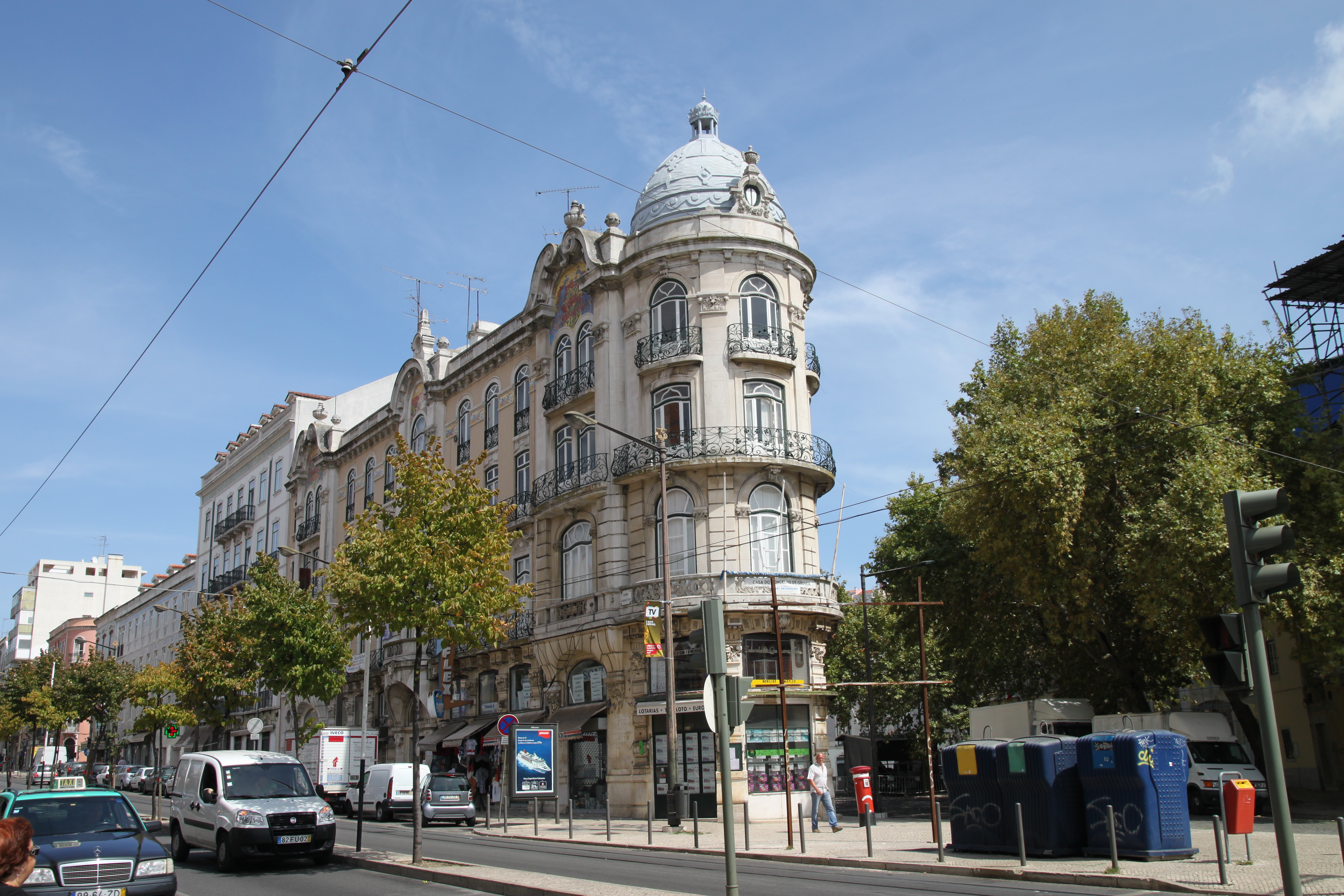 Edifício na Avenida Almirante Reis, n.º 2 a 2K